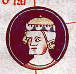 Le duc Hugues le Grand représenté en médaillon dans un arbre généalogique (détail d'une enluminure du XIVe siècle).